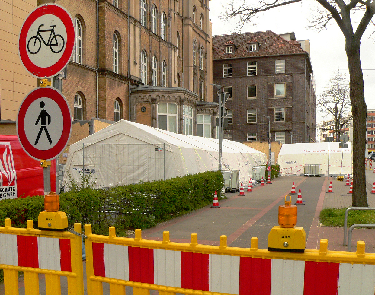 Erweiterte Notaufnahme wegen Covid 19